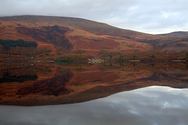 Rowardennan Lodge, Loch Lomond